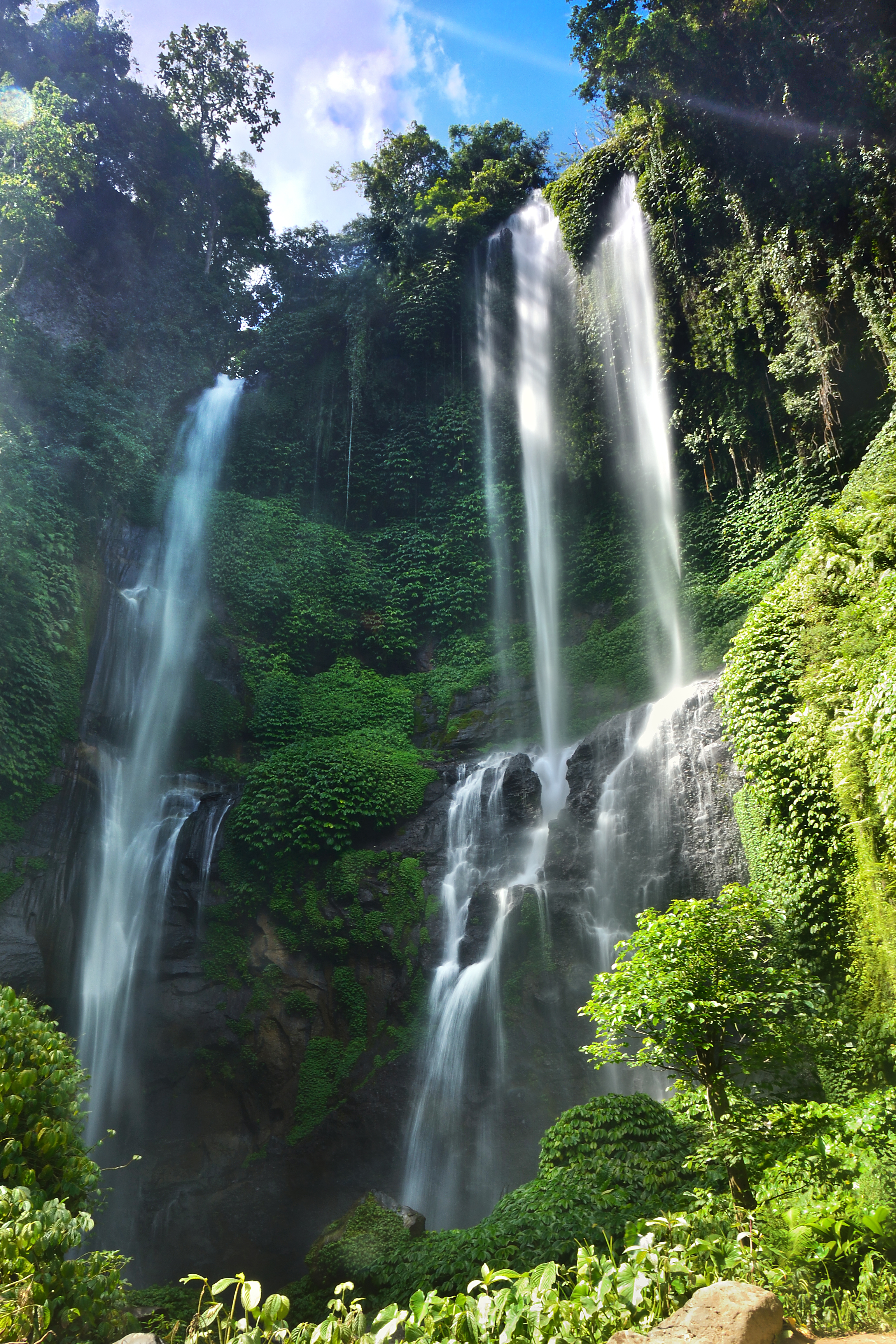 Air Terjun Sekumpul juga dikenal dengan nama Air Terjun Gerombong. Air terjun ini memiliki ketinggian sekitar 100 m Lokasi tersebut terletak di Desa Sekumpul, Kecamatan Sawan, Kabupaten Buleleng, Propinsi Bali. Teknik pengambilan foto ini adalah slow speed. Kamera Nikon D3100 dan Lensa Kit.